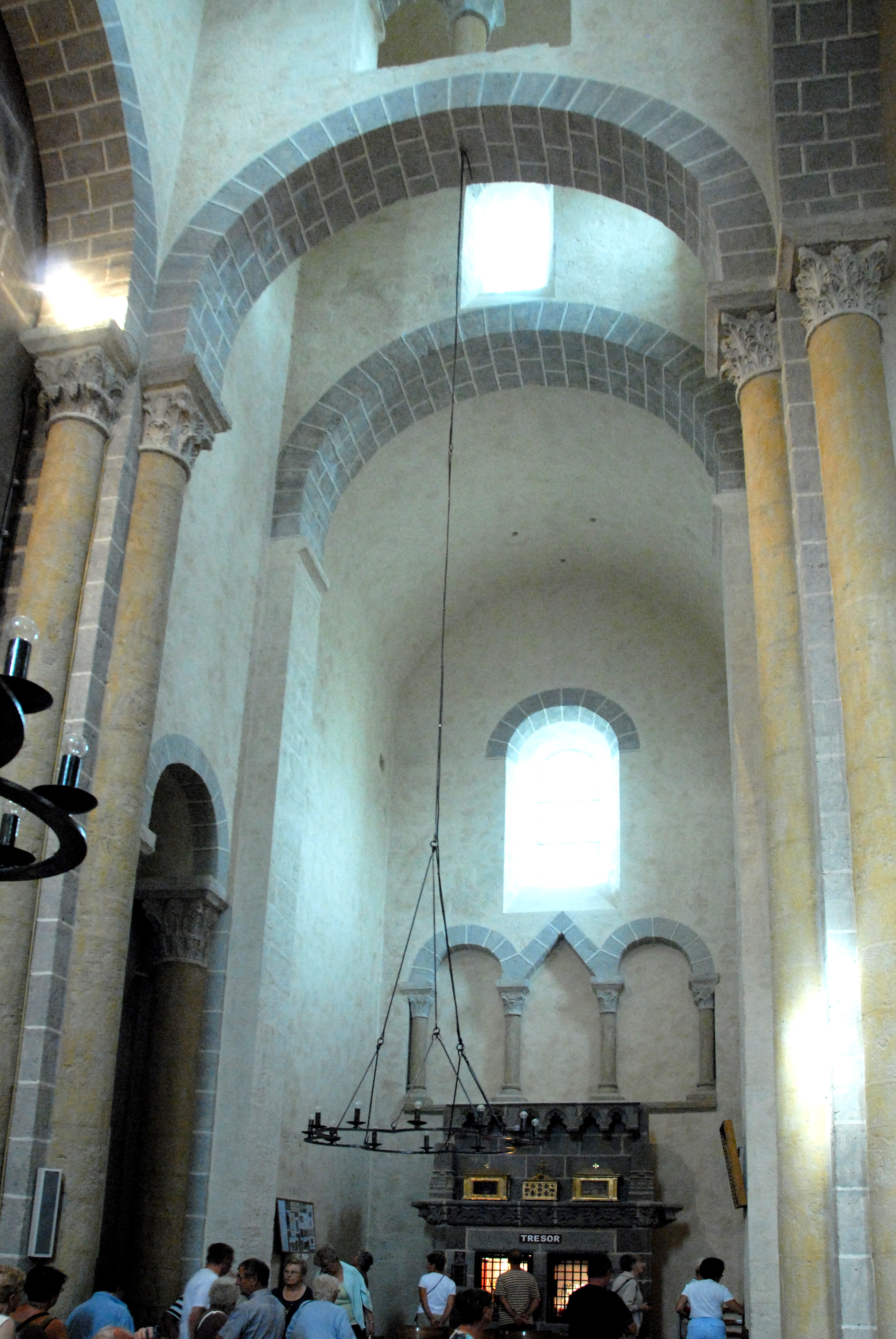 St.-Nectaire, nördlicher Querhausarm